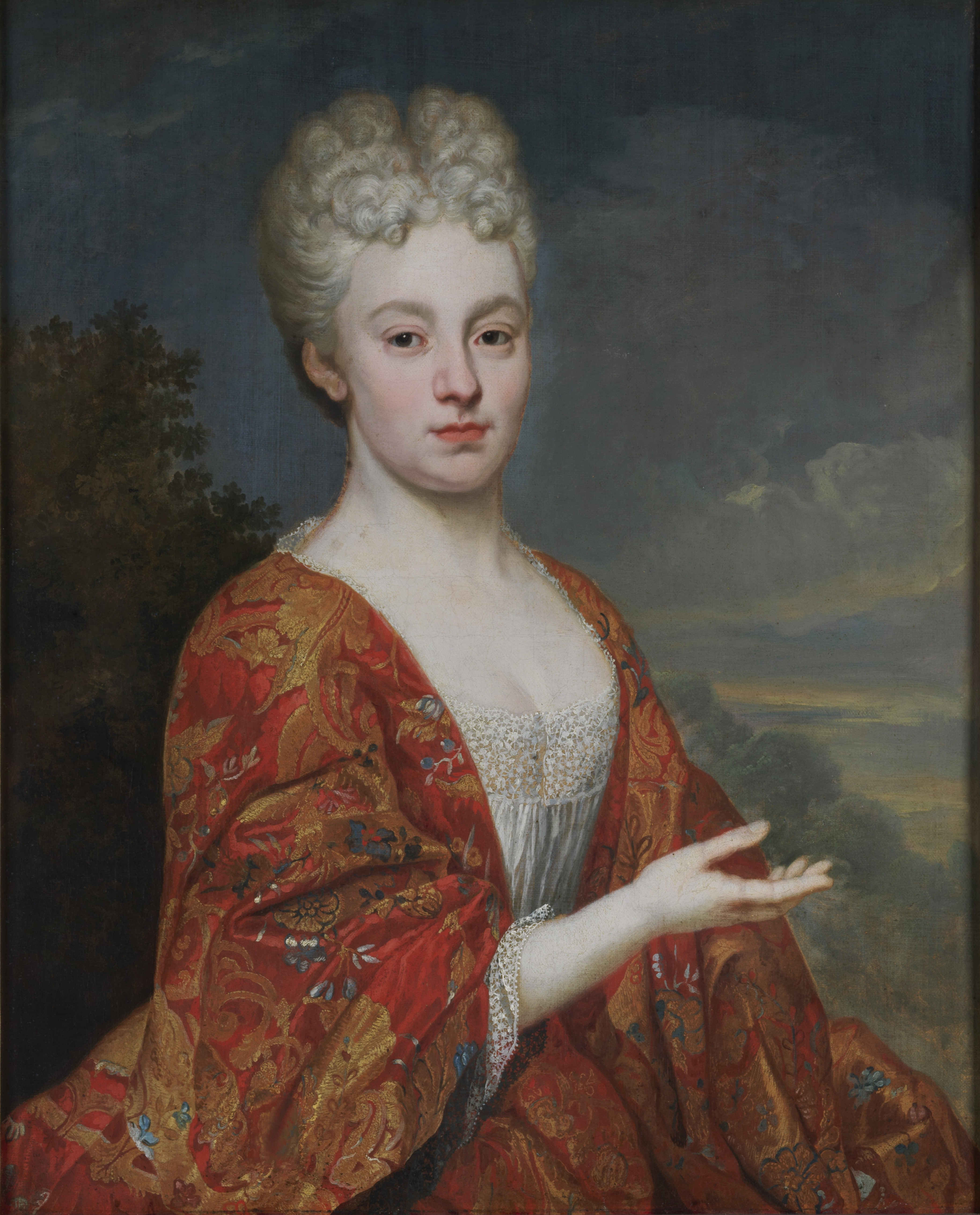 schilderij ( Jan van Helmont ( Museum Plantin-Moretus